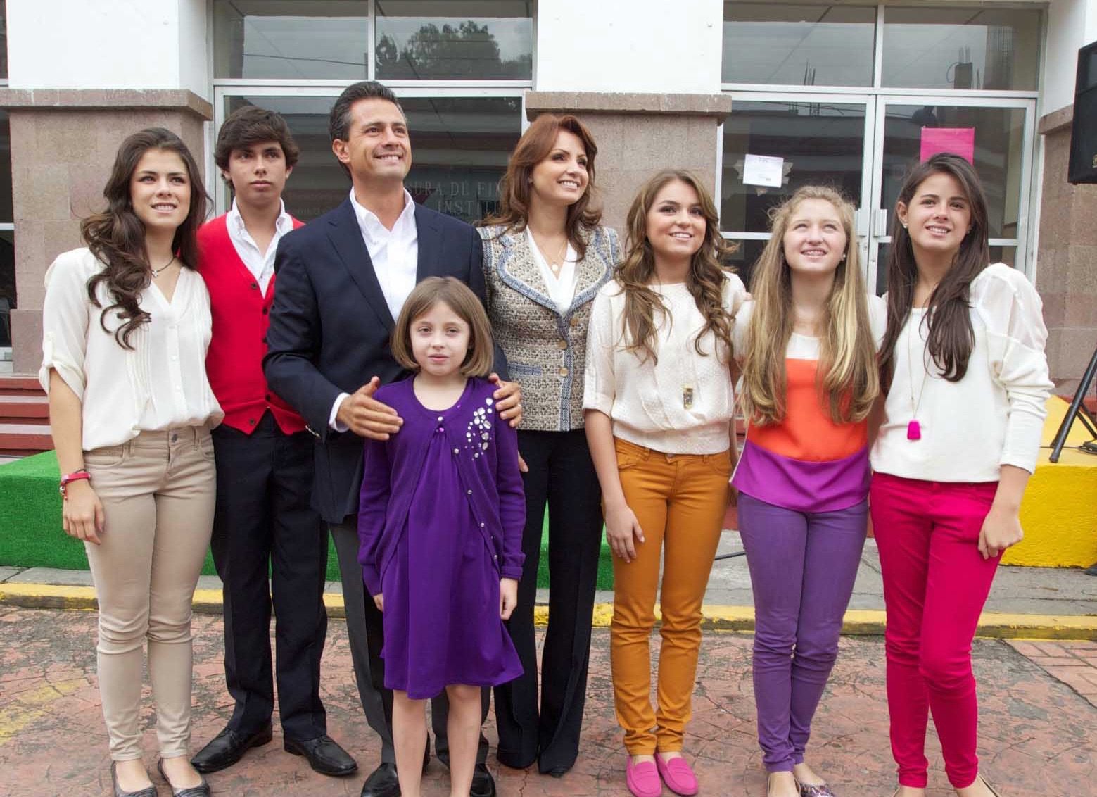 Atlacomulco, Estado de México. Emitiendo el voto. Atlacomulco, Estado de México. 1 de Julio de 2012.